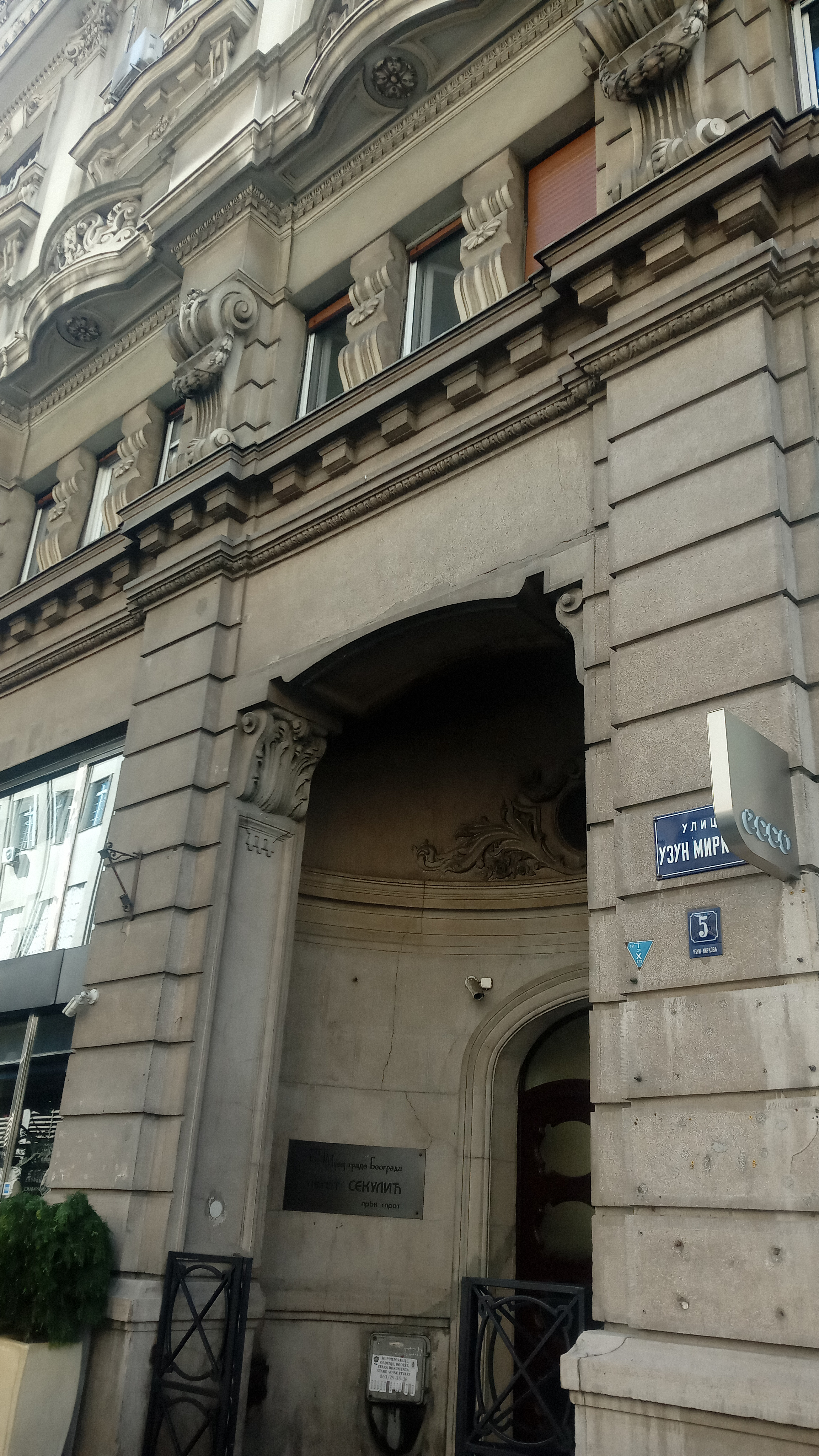 Srpski (latinica): Uzun Mirkova ulica, broj 5, Beograd, Srbija